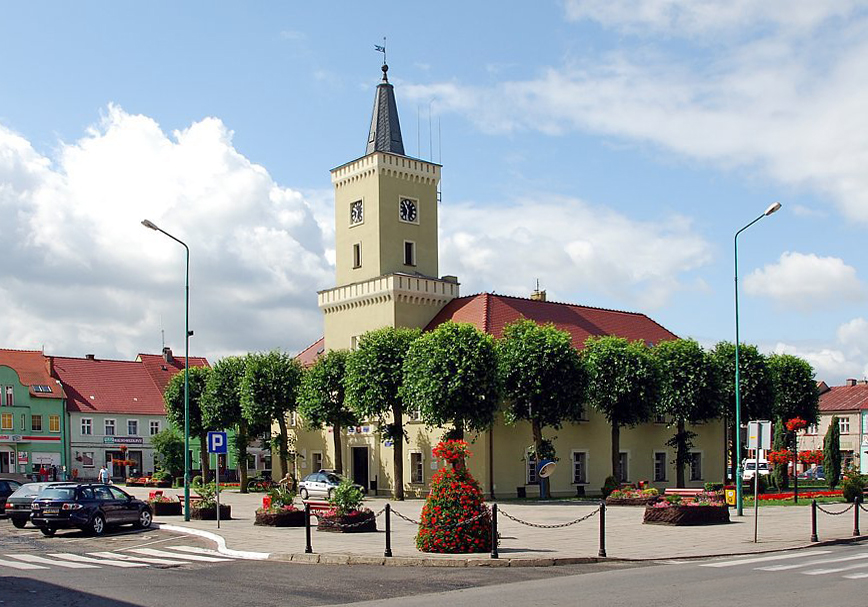 Ratusz w Kargowej. Widok z kierunku północno-wschodniego. Po prawej stronie widać fragment pierzei południowej Rynku.